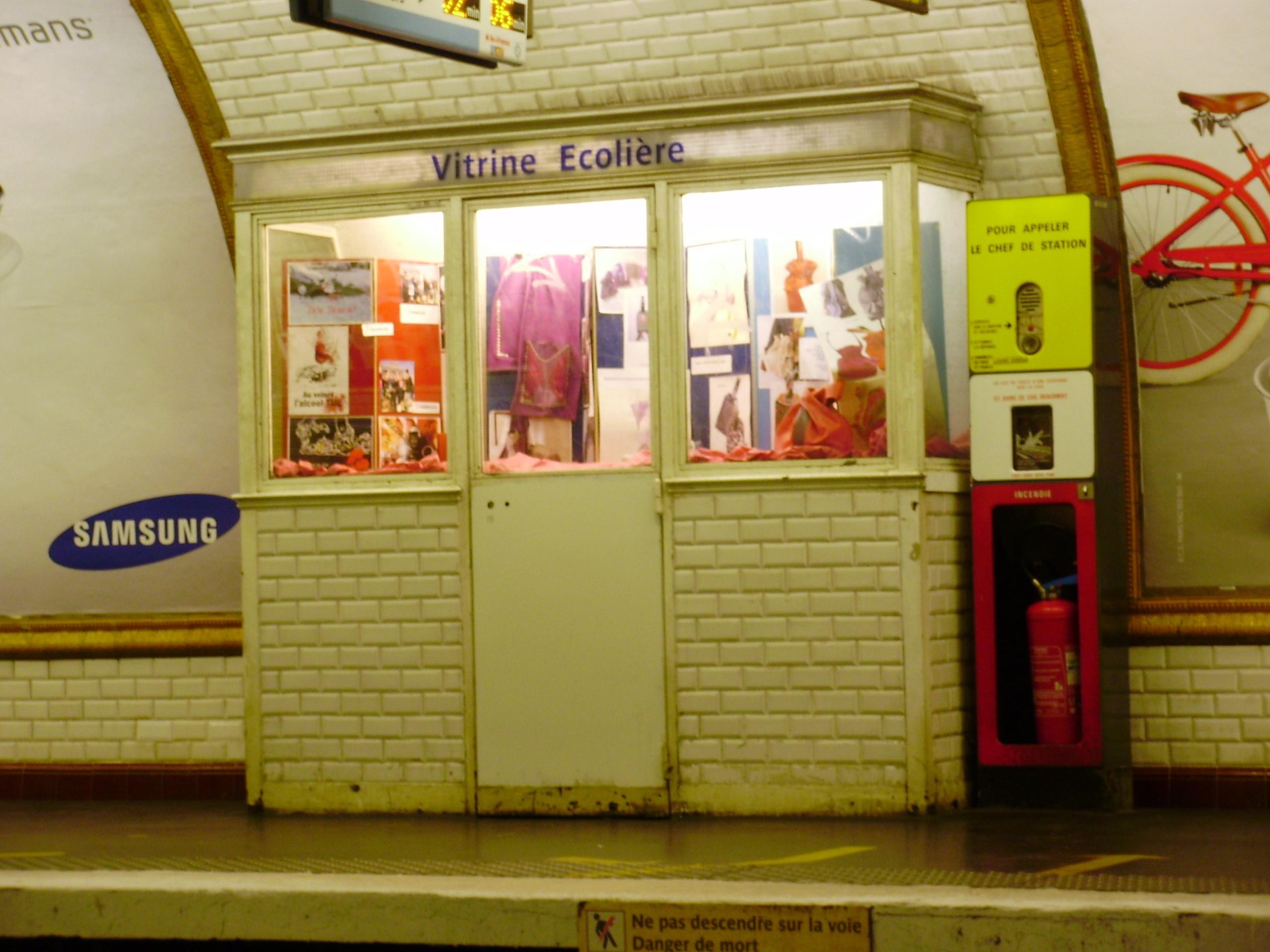 Station de métro Pernety, Paris 14e, France : « vitrine écolière » sur un quai de la station dans l'ancien bureau du chef de station.